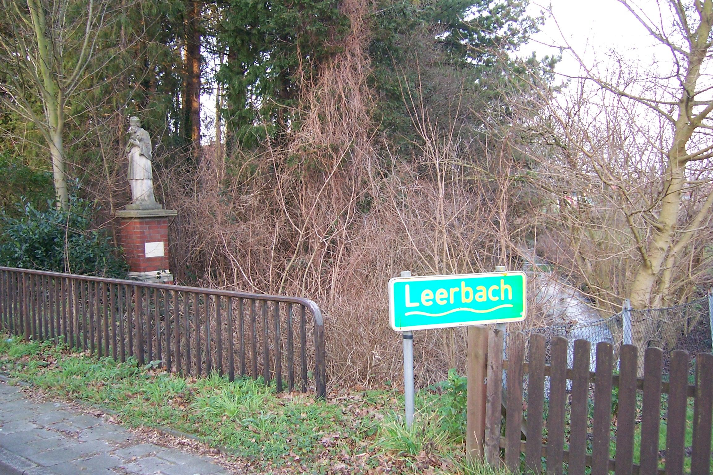 Verlauf des Leerbaches im Dorf Leer (Horstmar), Kreis Steinfurt , NRW, Germany.